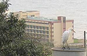 Funchal